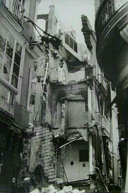 Bombardeo de Cadiz el 7 de Agosto de 1936 por el buque republicano Almirante Valdés